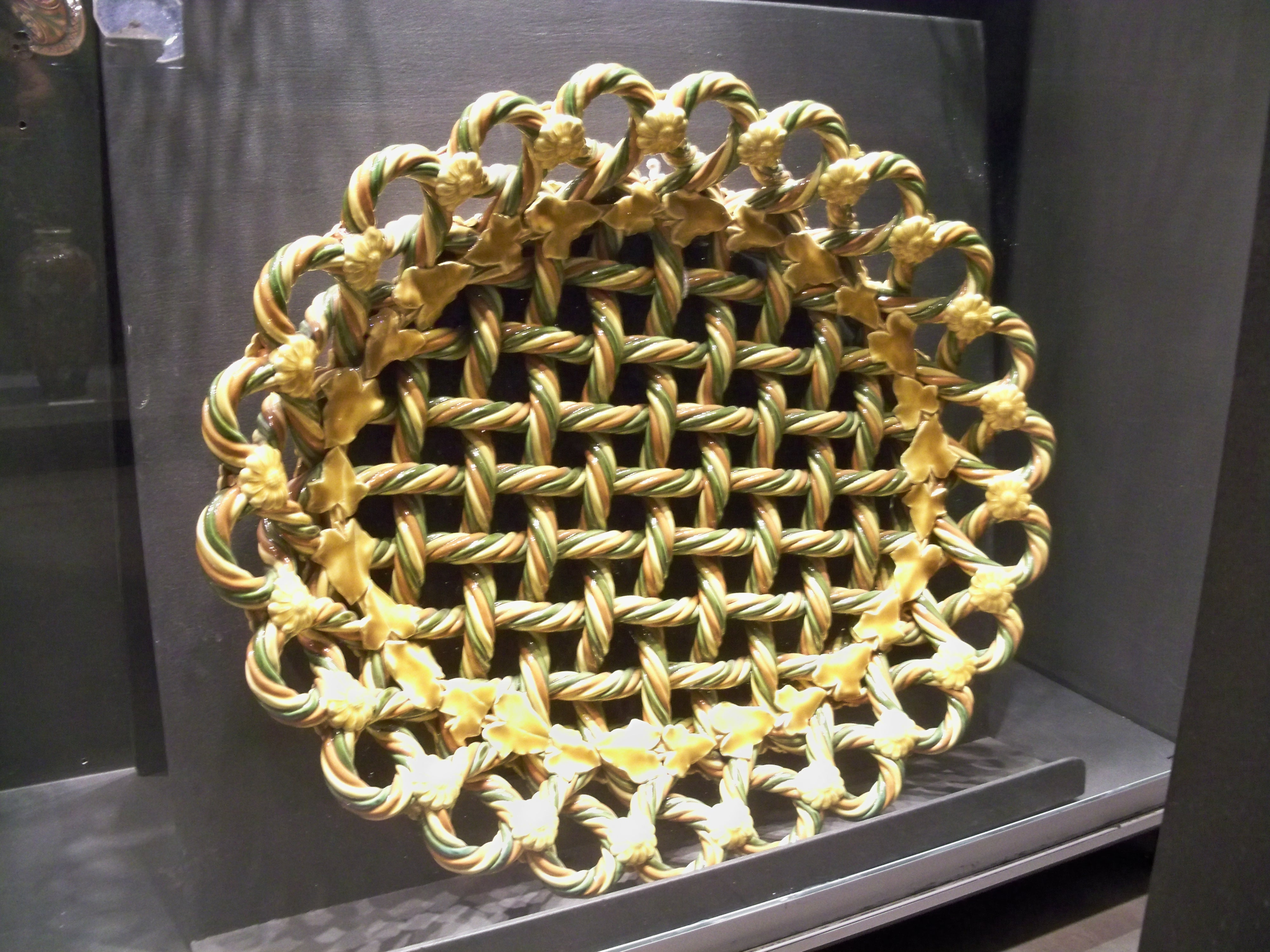 faience d'Apt (84)